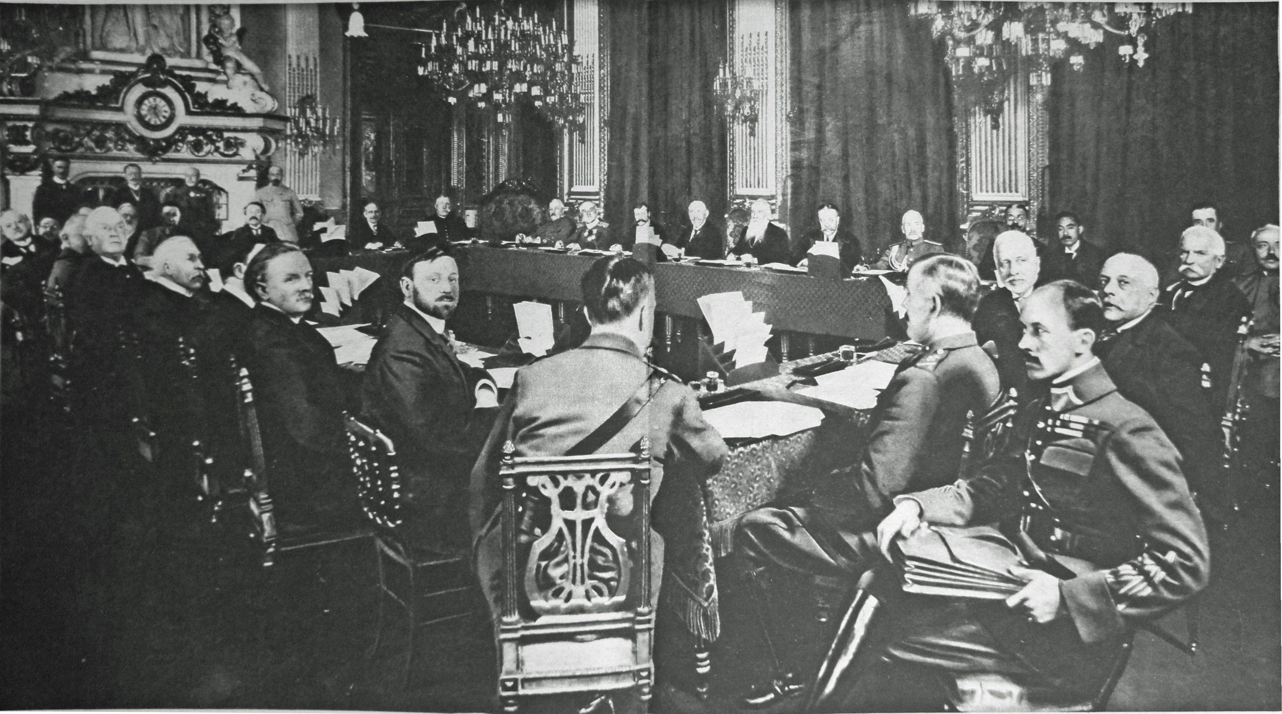 Le Miroir N°24, page centrale, conférence des Alliés des 27 et 28 mars 1916 où se trouvèrent : Kitchener( de dos, puis vers la gauche), Paul Mentoux, Llyod George, Edouard Grey, Bertie of Thame, Asquith, Wielmens, Beyens, de Broqueville, Jules Cambon, Albert Thomas, Léon Bourgeois, Roques, Briand, Lacaze, JOffre, De Castelnau, Rachitch, Yovanovitch, Vesnitch, Pachitch, Isvolski, Gilinsky, Joao Chagas, Koishiro Matsui, Alfredo Dall'Olio, Cadorna, Sonnino, Tittoni, Salandra, Robertson. Debout devant la cheminée : De Béarn, De Margerie, Pellé, Graziani.